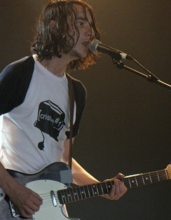 Tom Gorman - chanteur / guitariste des Kill The Young à Solidays 2006 photo de Sandra CARPENTIER